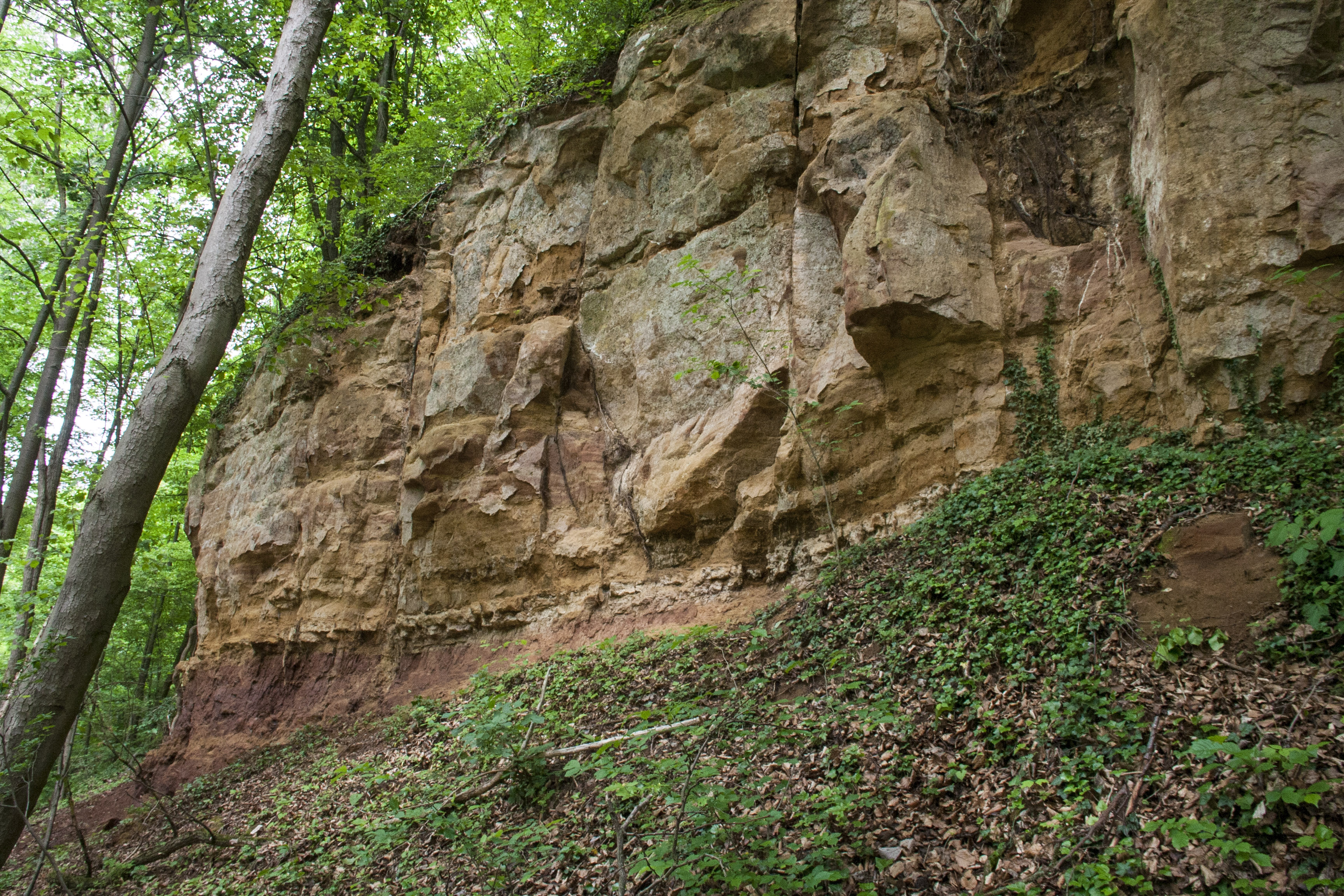 Houbirg, Happurg, Landschaftsschutzgebiet Südlicher Jura mit Moritzberg und Umgebung, Doggerwerk